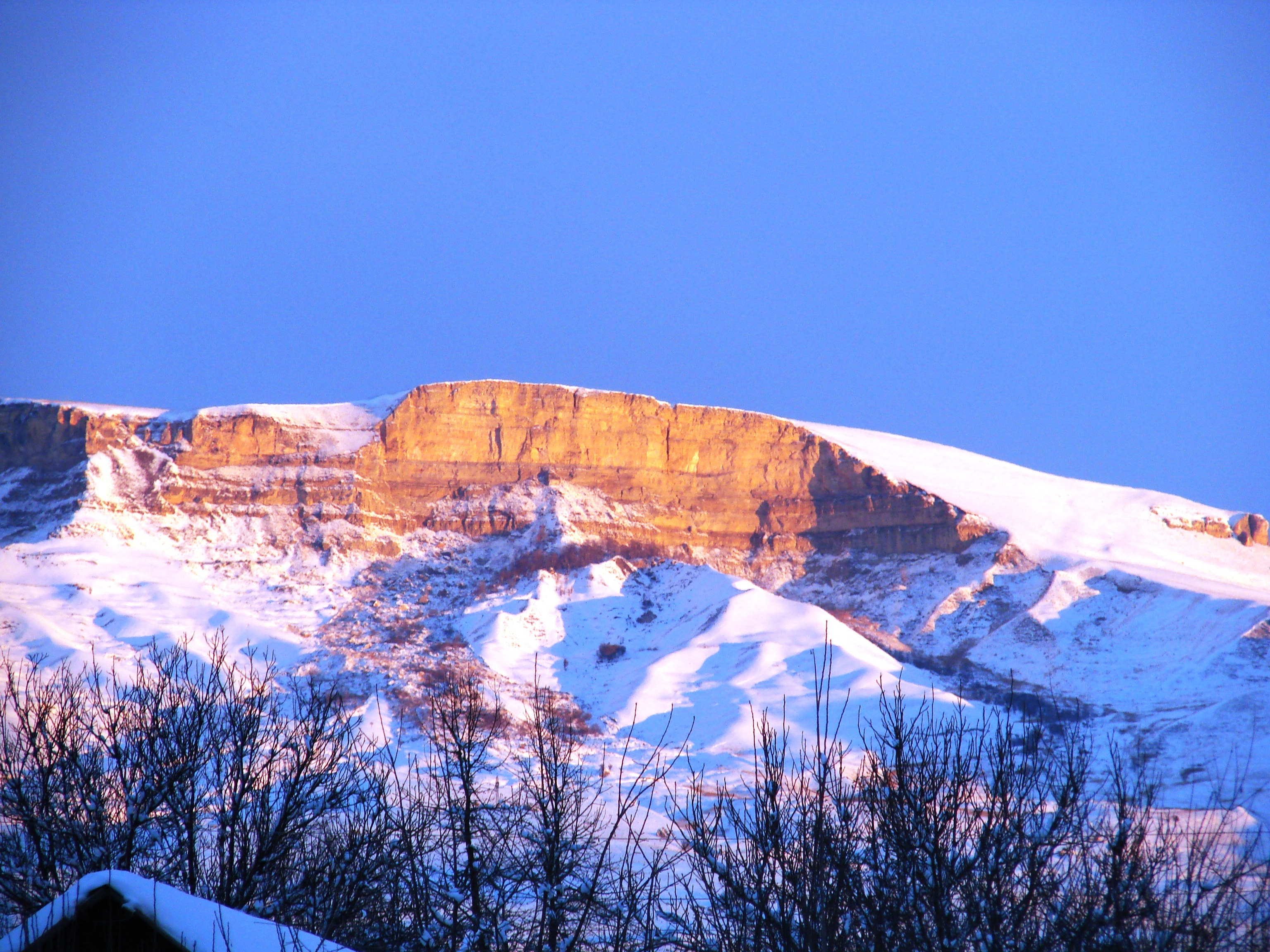 В утренних лучах